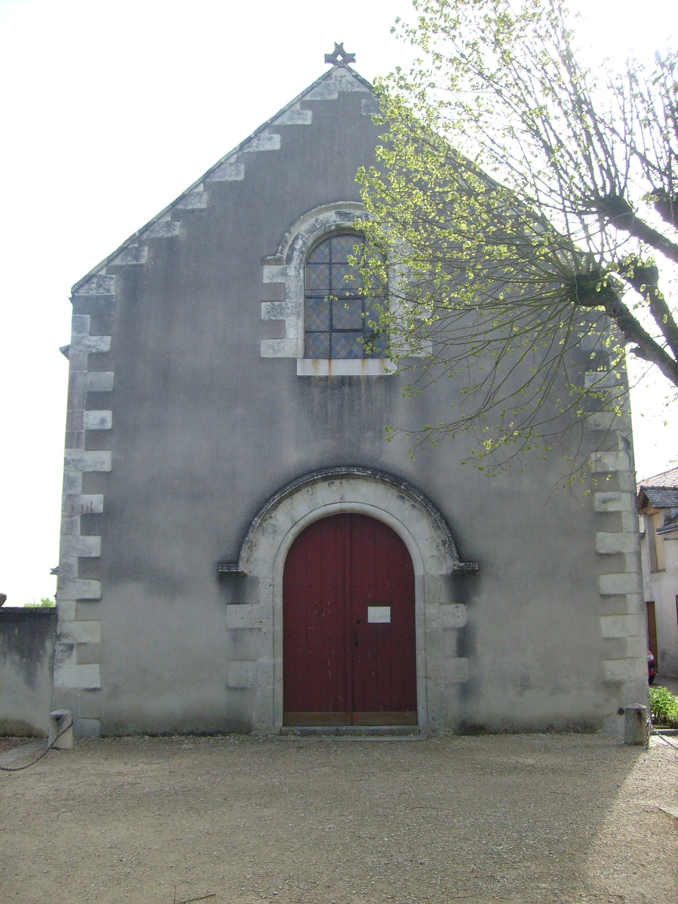 Église de Dame Marie les Bois